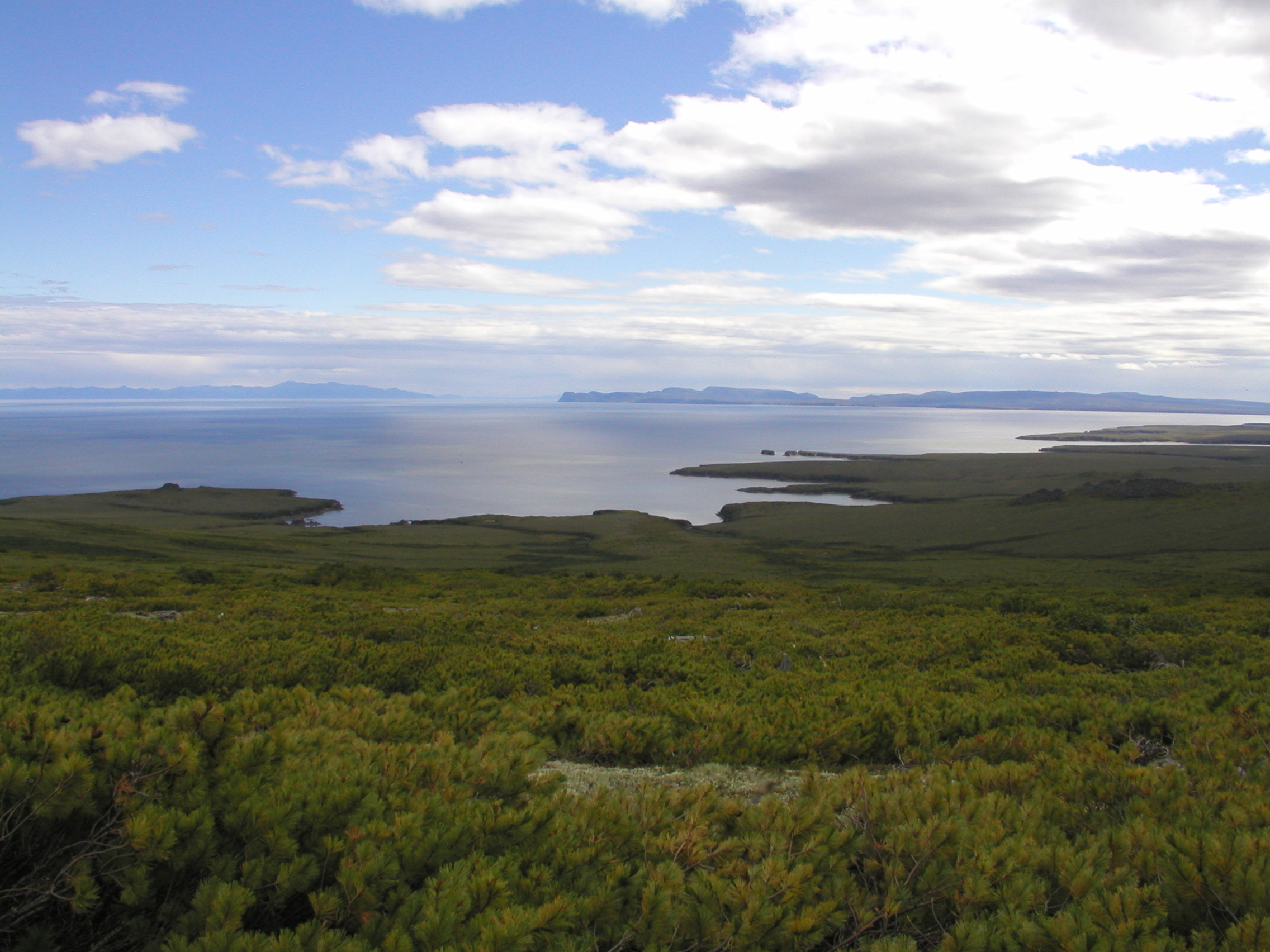 Пенжинский прибрежный, Пенжинский район This image is related to the protected area of Russia number 4110148